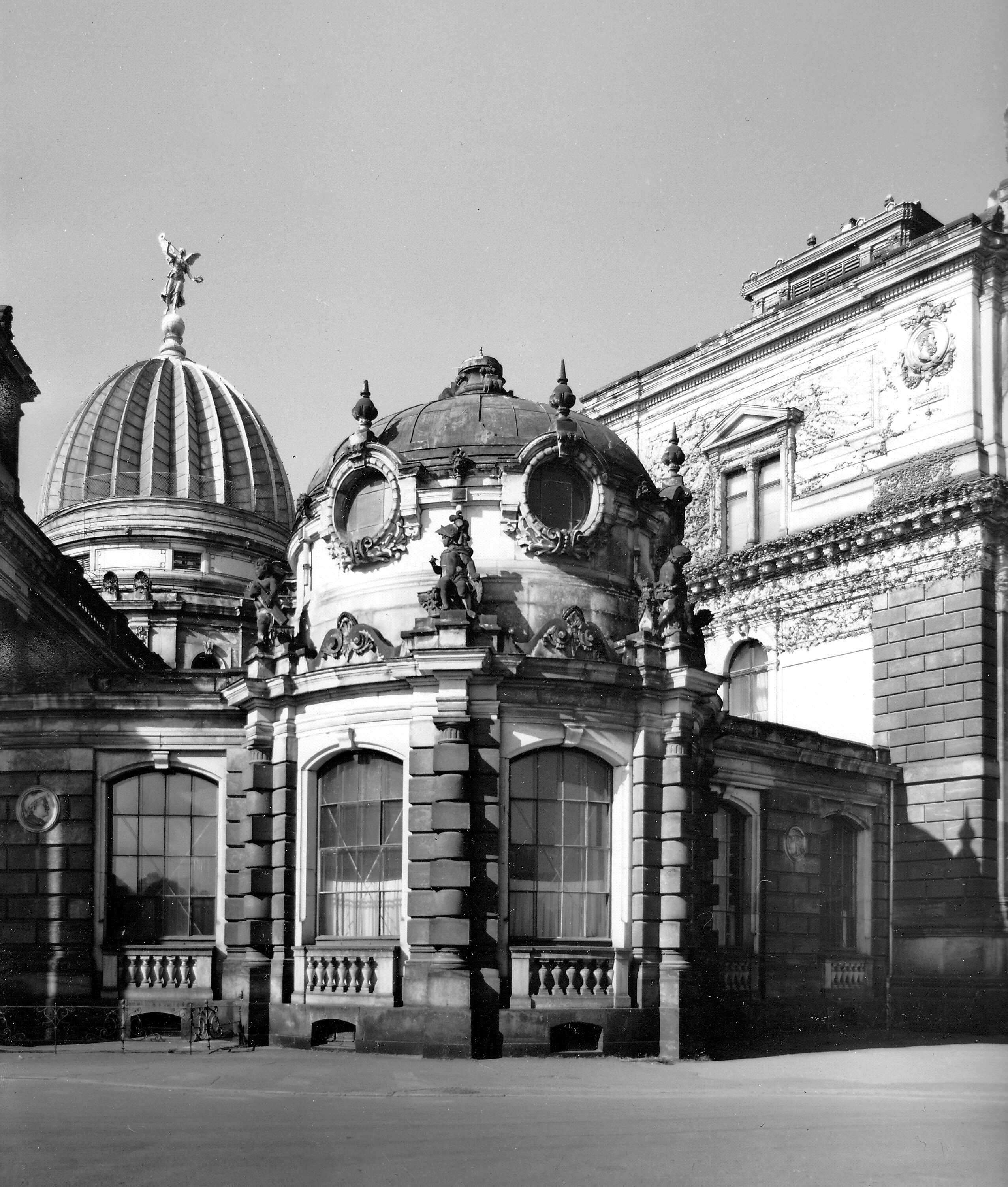 12.05.1988 Dresden, Brühlsche Terrasse: Kunstakademie / Sächsischer Kunstverein. [R19880512B15A]19880512570AR.JPG(c)Blobelt